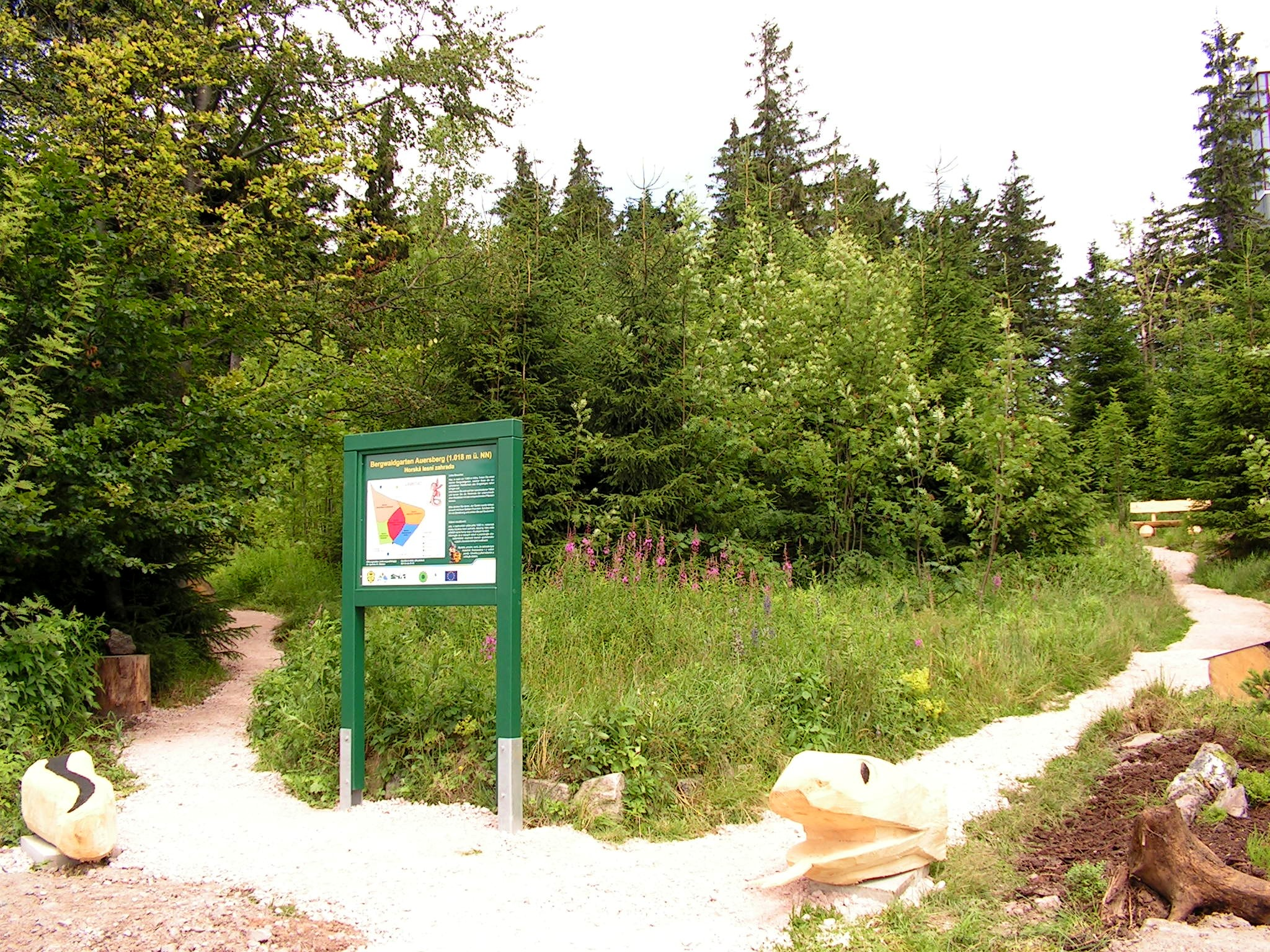 Zweisprachiger Lehrpfad "Bergwaldgarten Auersberg" im sächsischen Erzgebirge